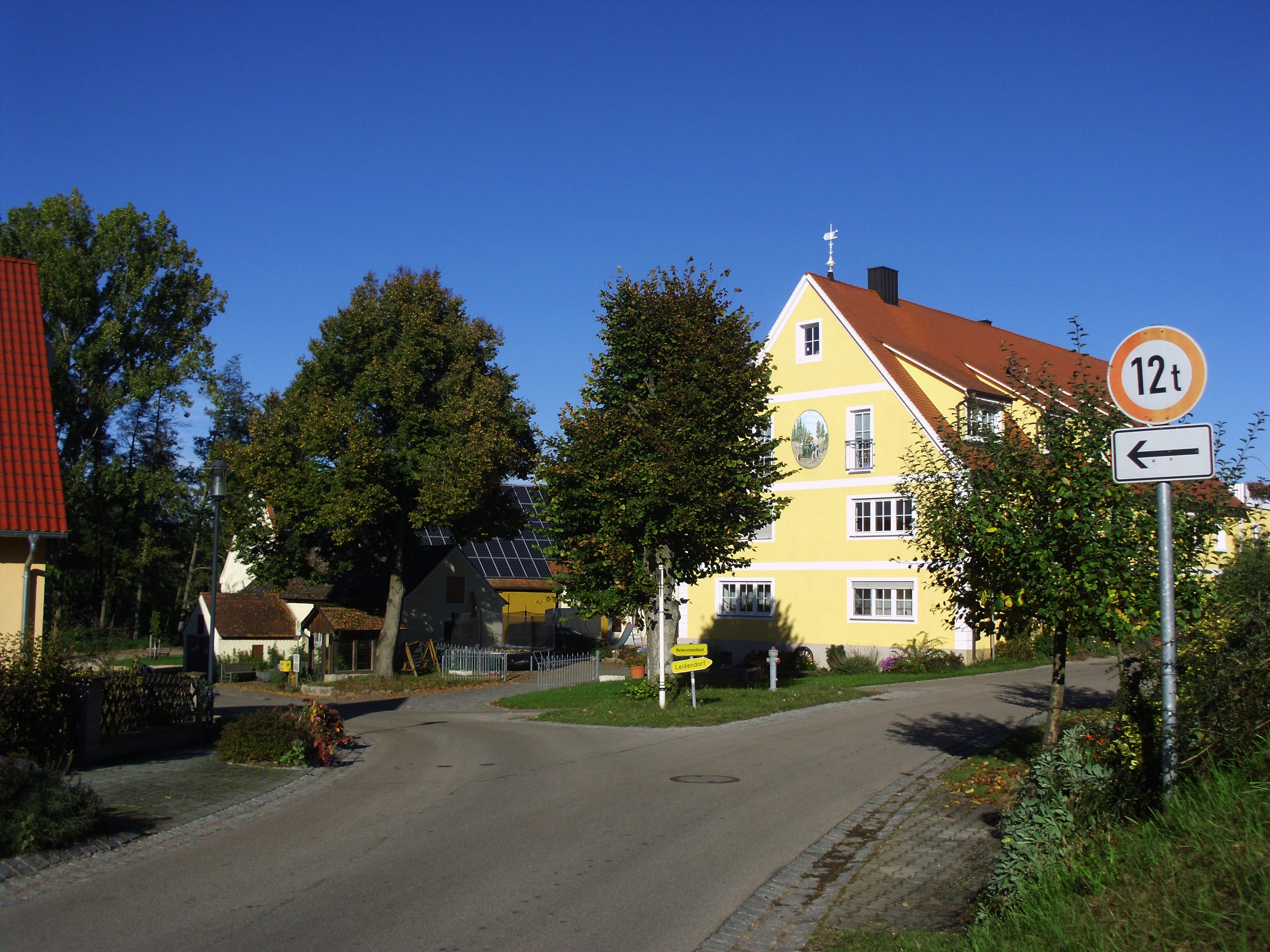 Kolmschneidbach, Ortsteil von Weidenbach im Landkreis Ansbach